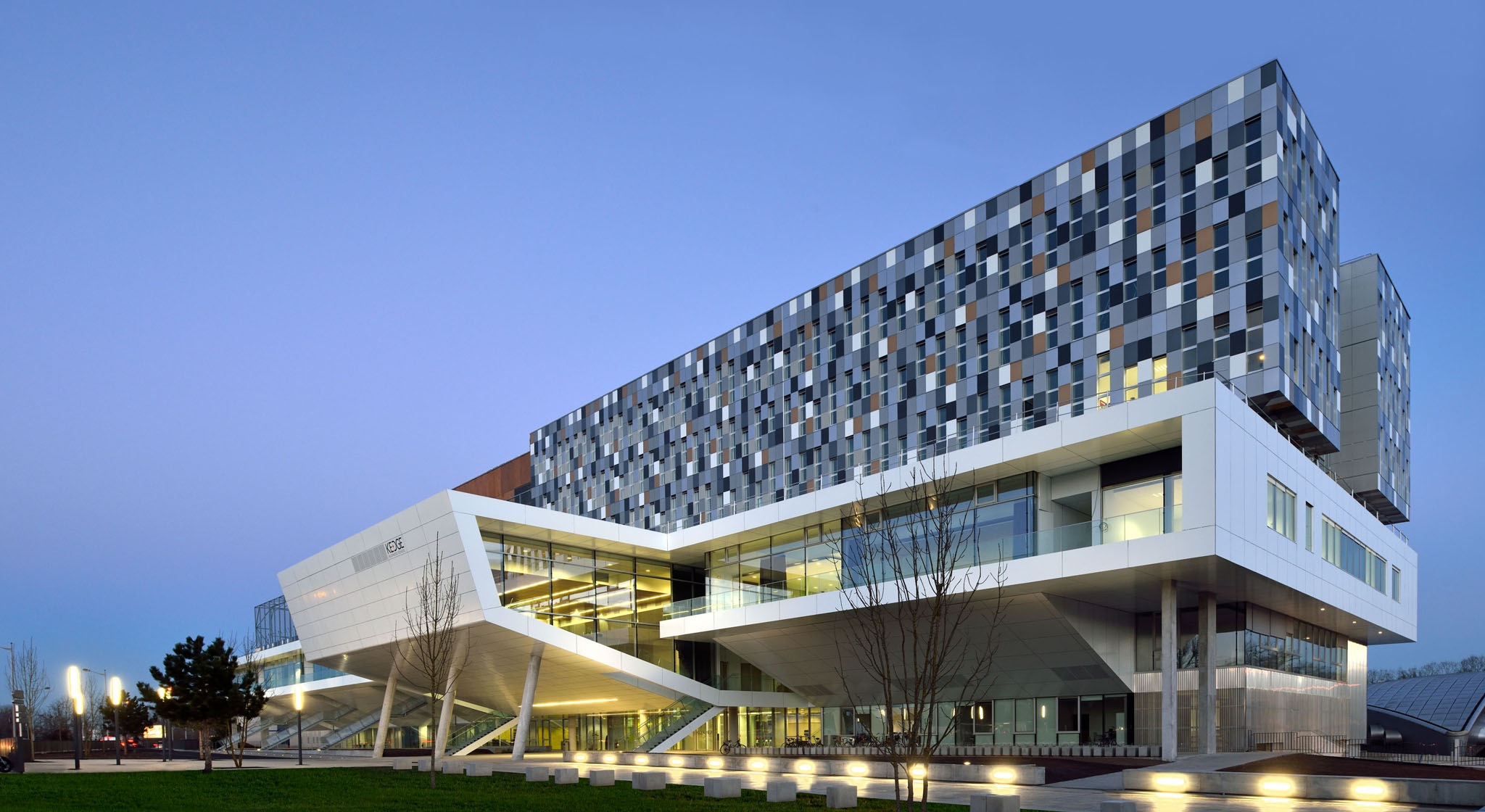 Campus Kedge BS à Bordeaux